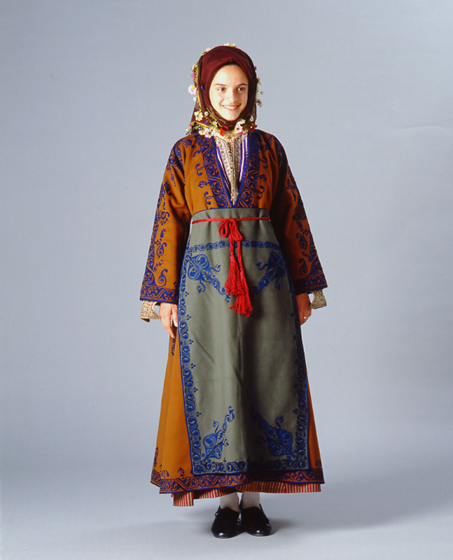 Νυφική ή γιορτινή φορεσιά από τη Νίγδη Καππαδοκίας. Συλλογή Πελοποννησιακού Λαογραφικού Ιδρύματος, Ναύπλιο